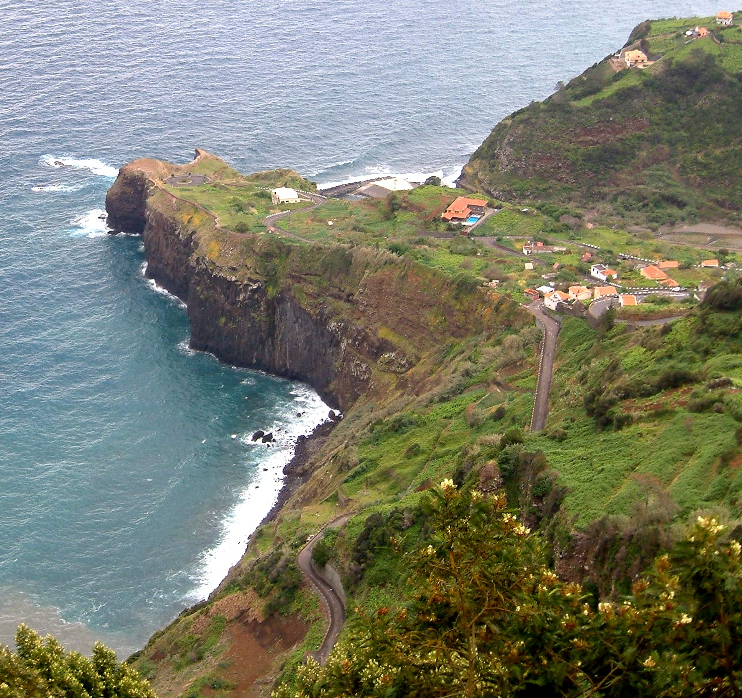 Madeira_nordostküste_5-07. Photograph: Peggy